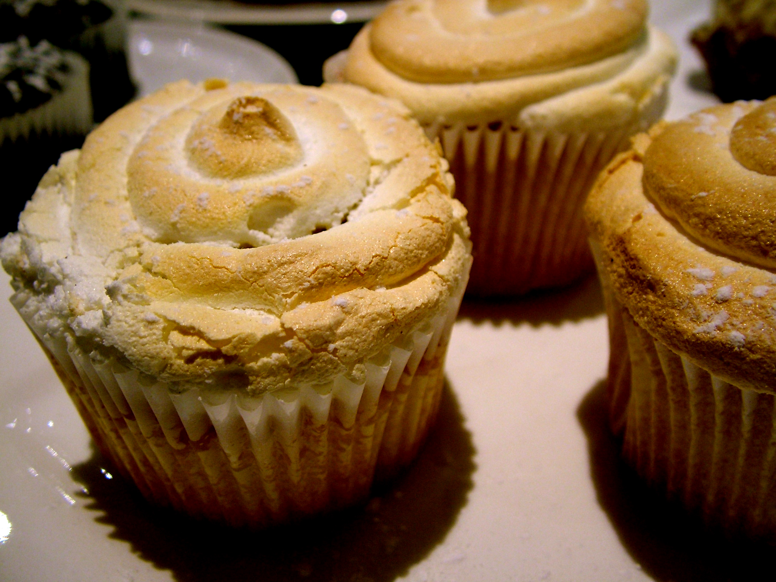 Lemon Meringue Muffins